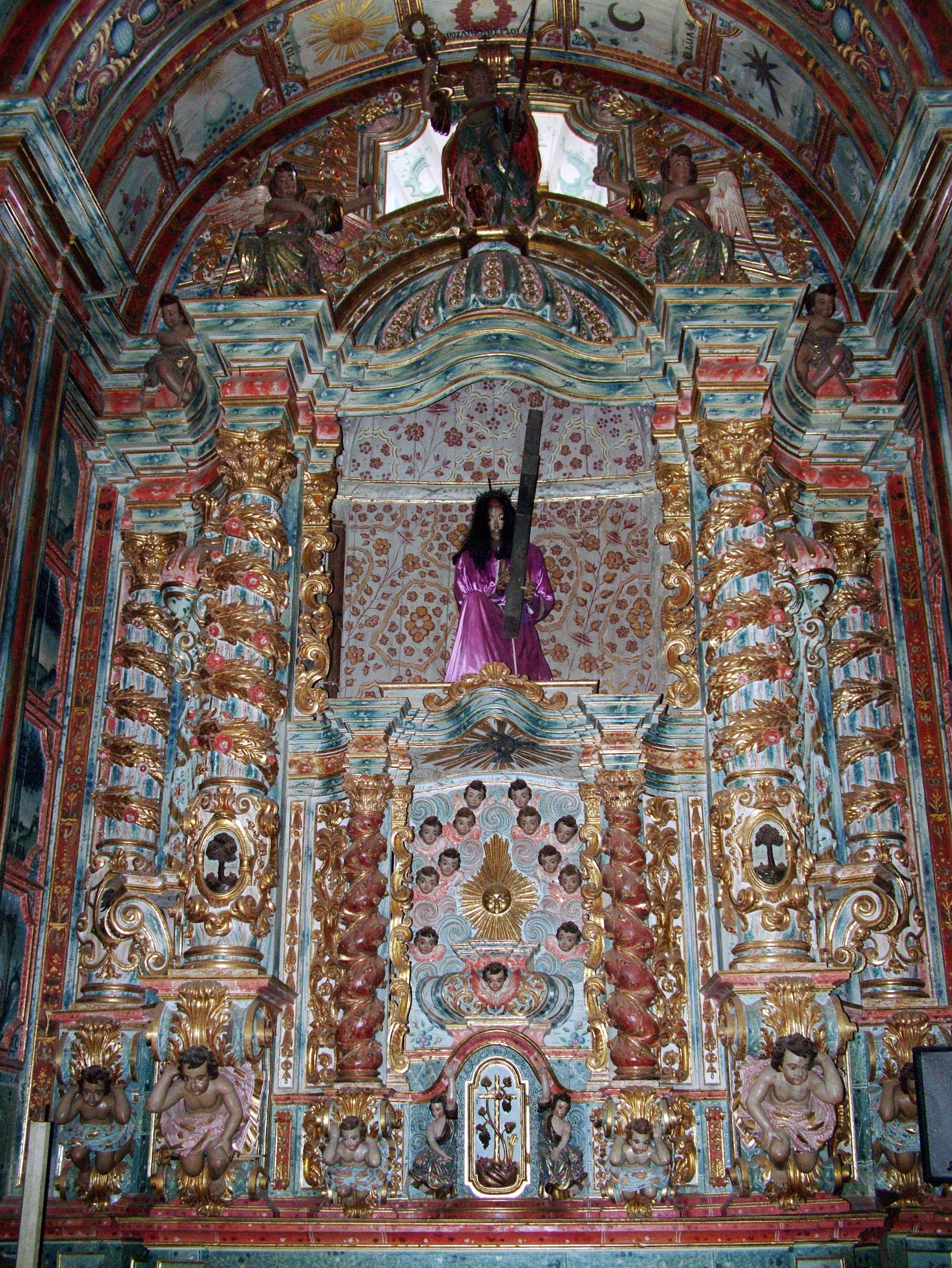 Retábulo de São Miguel e Almas da Igreja Matriz de Nossa Senhora da Conceição. Catas Altas, Minas Gerais, Brasil. Cultural property Parish Church of Our Lady of the Conception, Catas Altas, Minas Gerais, Brazil Q10300059, P727: iPatrimônio ID: catas-altas-igreja-matriz-de-nossa-senhora-da-conceicao, HPIP ID: 1364, IPHAN ID: 75/6